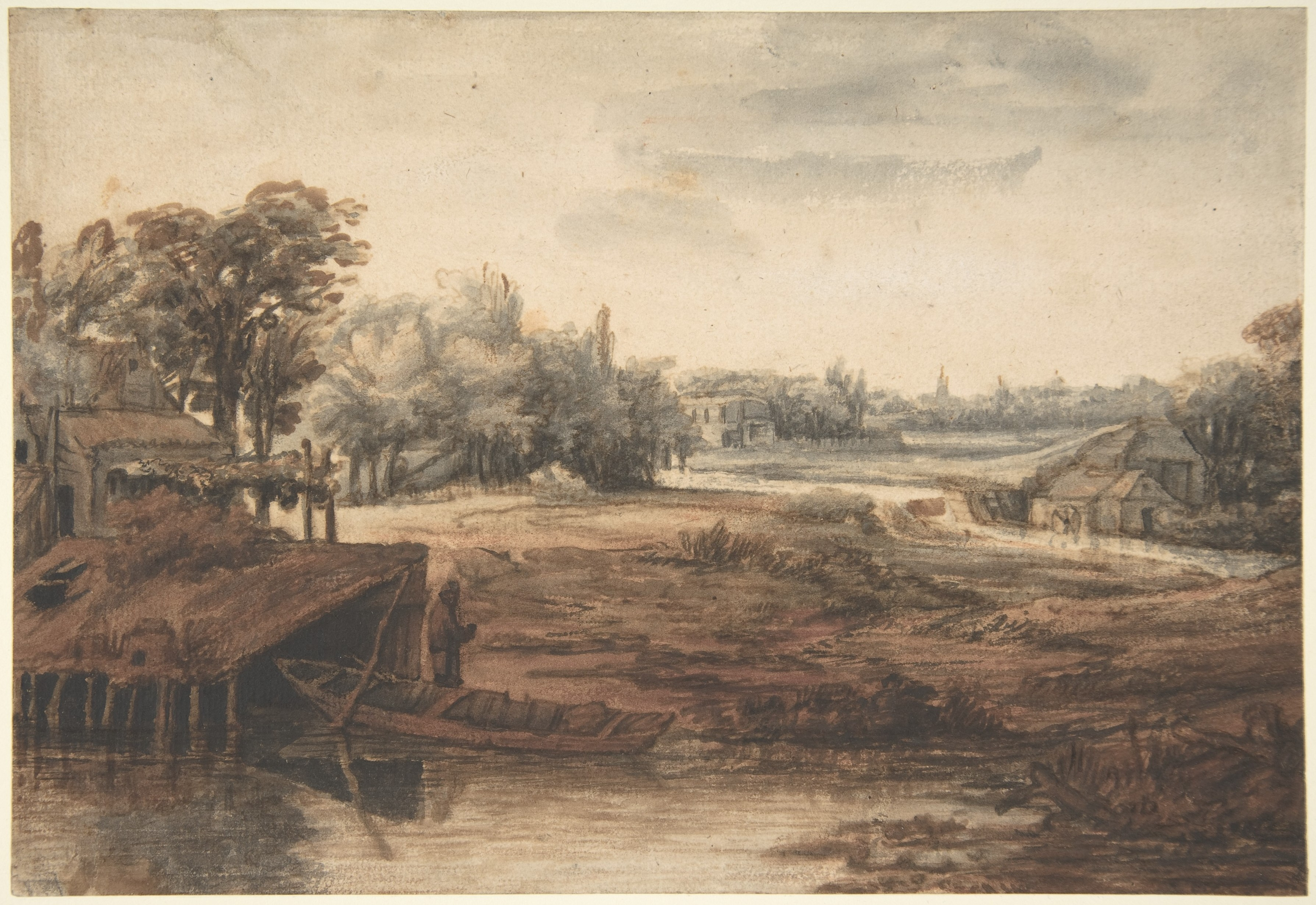 Drawing; Drawings